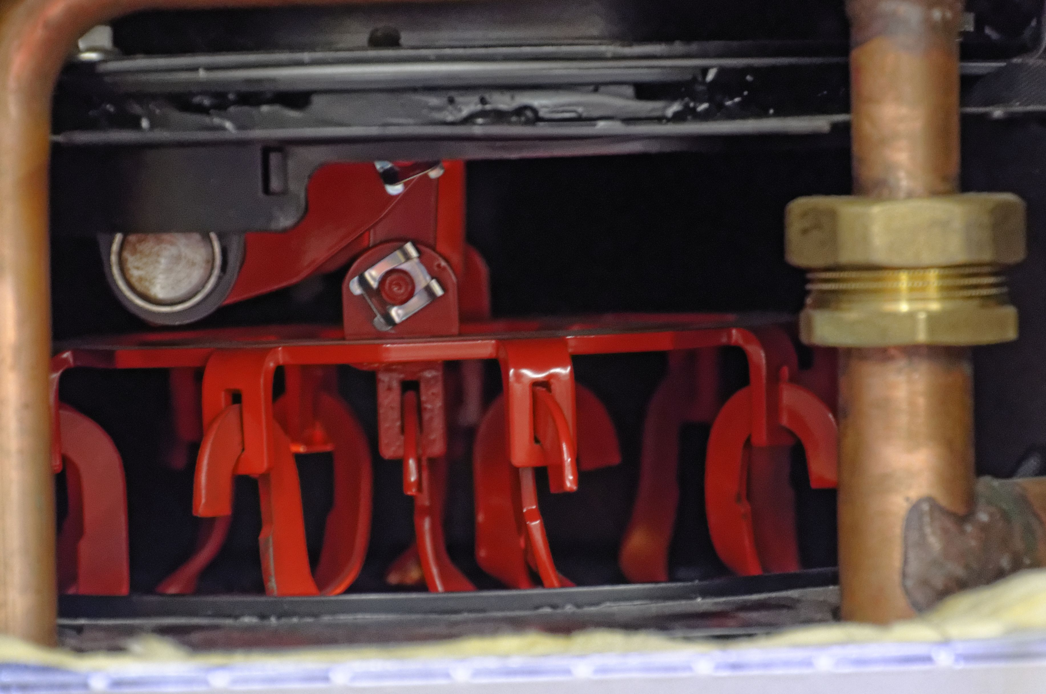 Sindelfingen Haus & Energie 2019